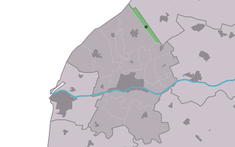 Kaartsje fan himrik fan Firdgum